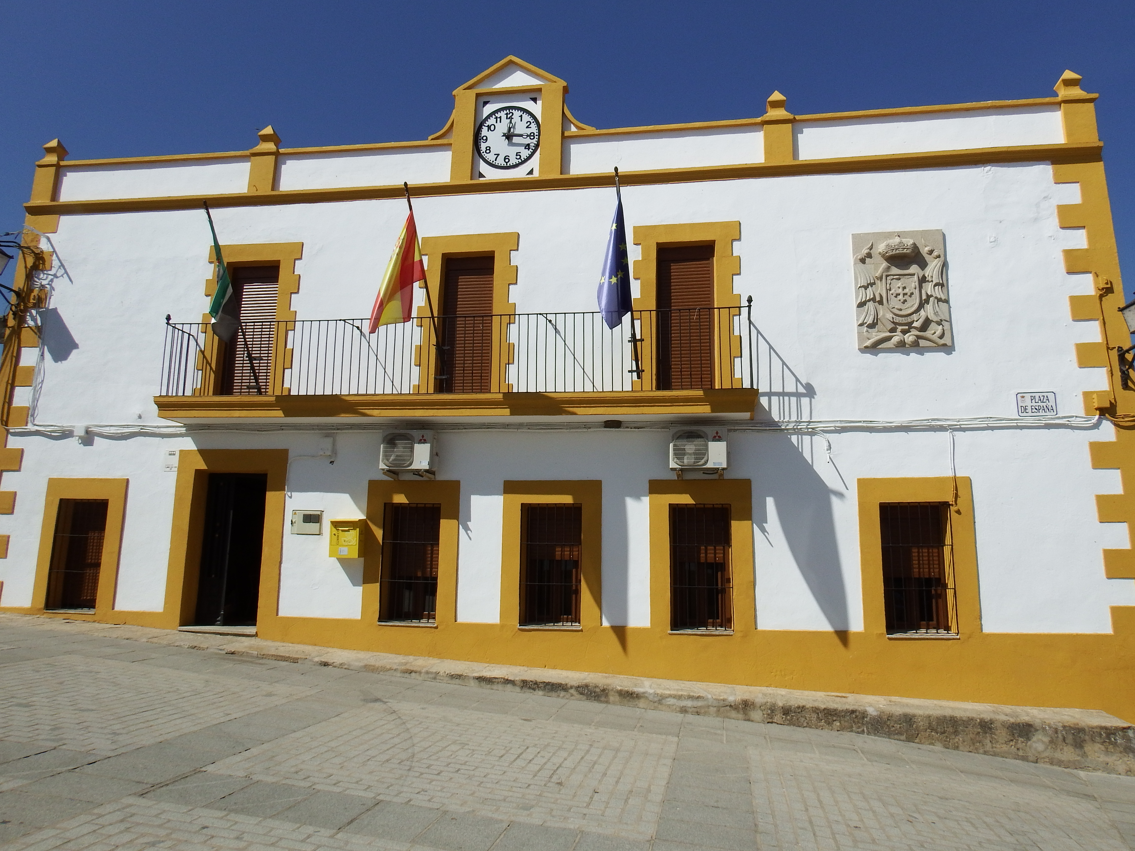 Ruanes